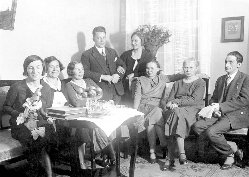 Julio Baghy kun esperantistoj en Tallinn, 1935. De dekstre: Julio Baghy, Helmi Dresen, Hilda Dresen.